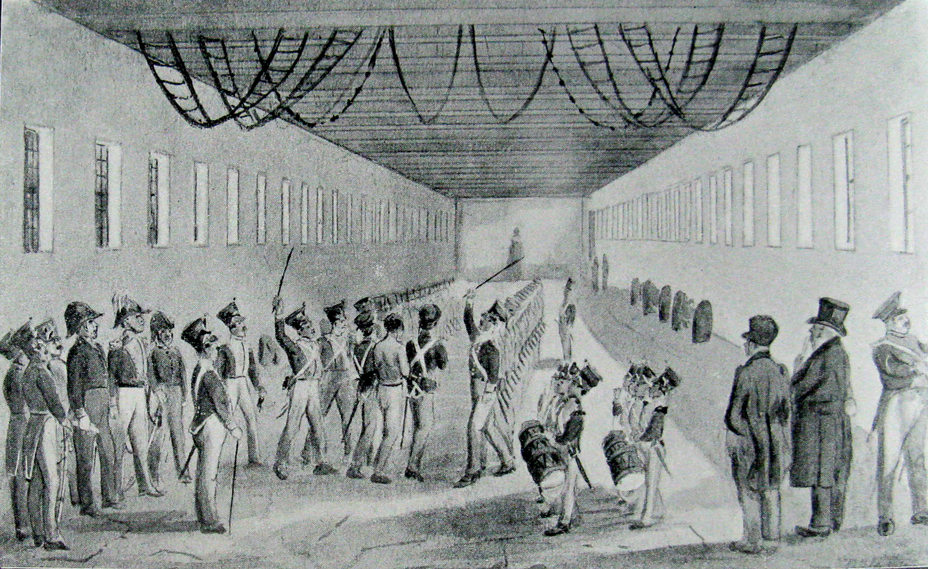 Spidsrodsløben i Gothersgades Eksercerhus i København. En barbarisk militær afstraffelse der først afskaffedes i det 19. aarhundrede. For at dæmpe det ulykkelige offers skrig rørtes trommer under Straffens Fuldbyrdelse